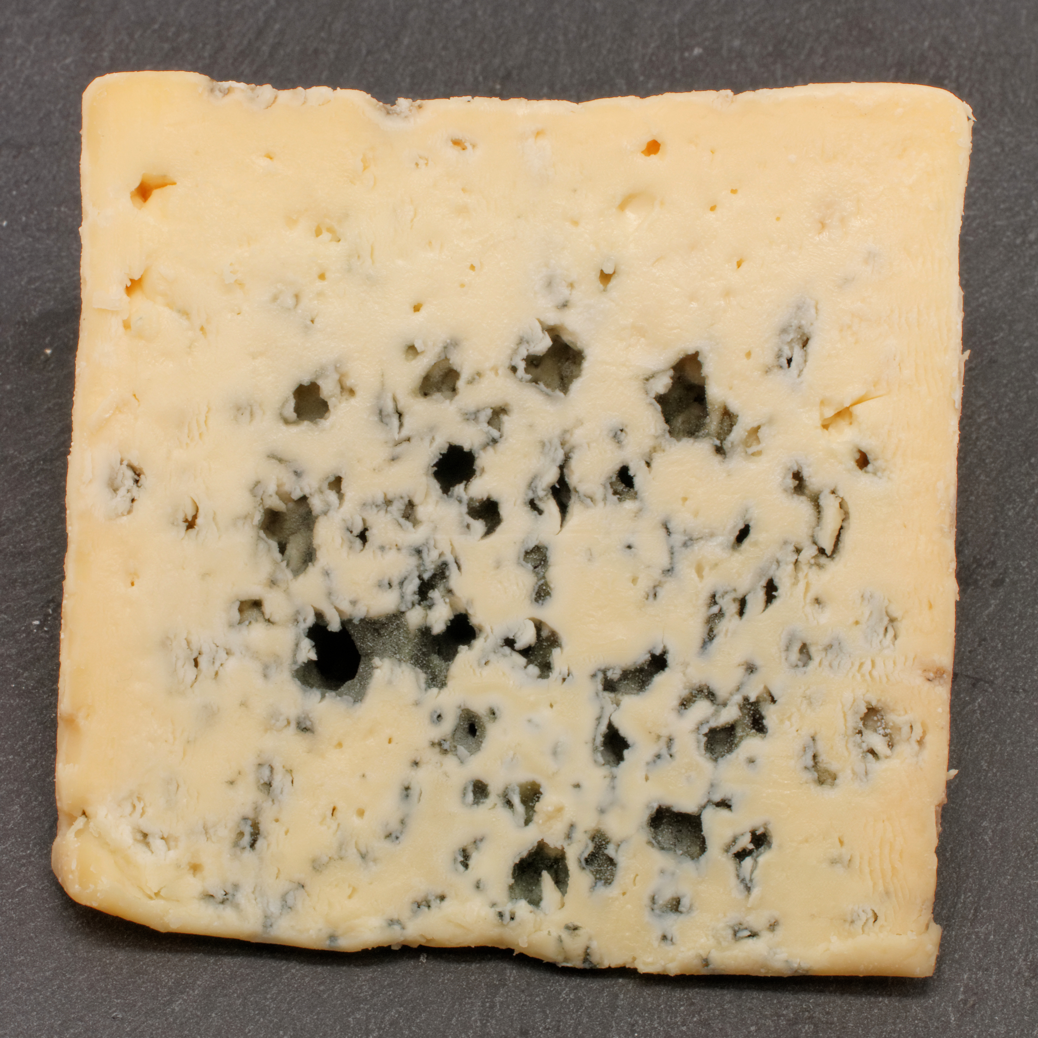 Bleu des Causses ; Androuet 17e